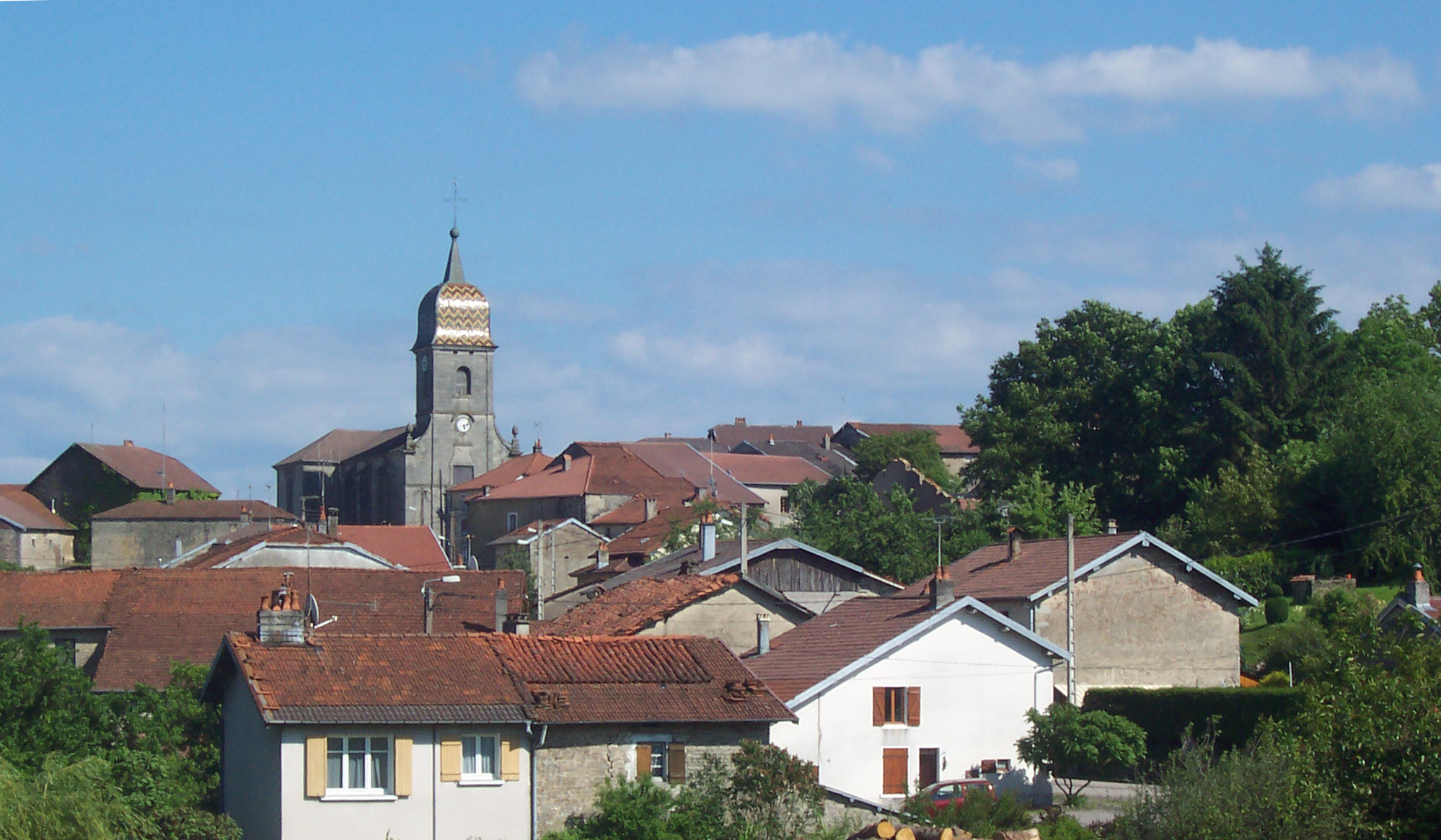 Harsault-Eglise XVIIIème